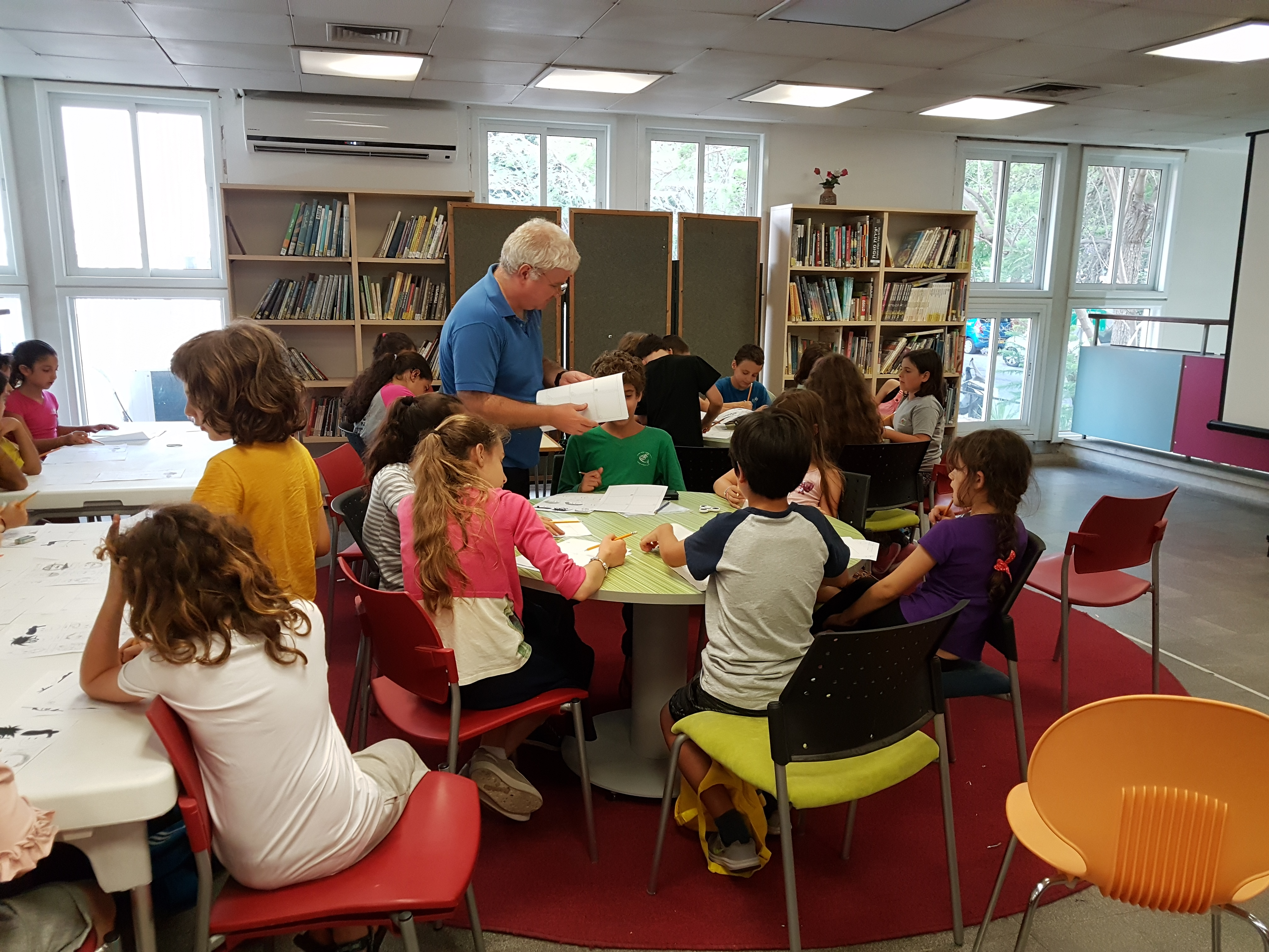 תלמידים בסדנת קומיקס בספריית הנוער של רמת-גן , בהדרכת הסופר והמאייר אורי פינק